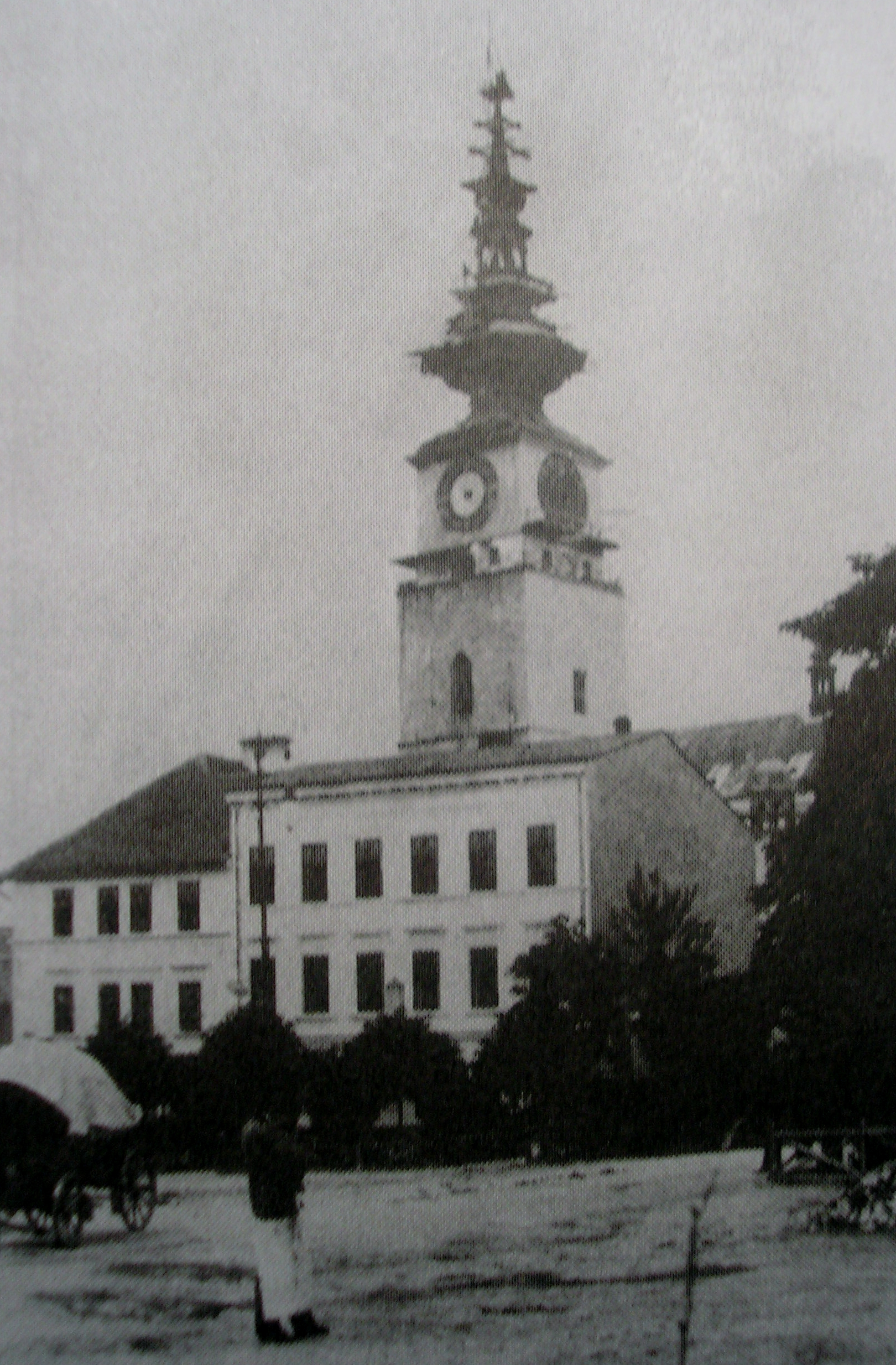 Městská věž v Třebíči v průběhu rekonstrukce roku 1905